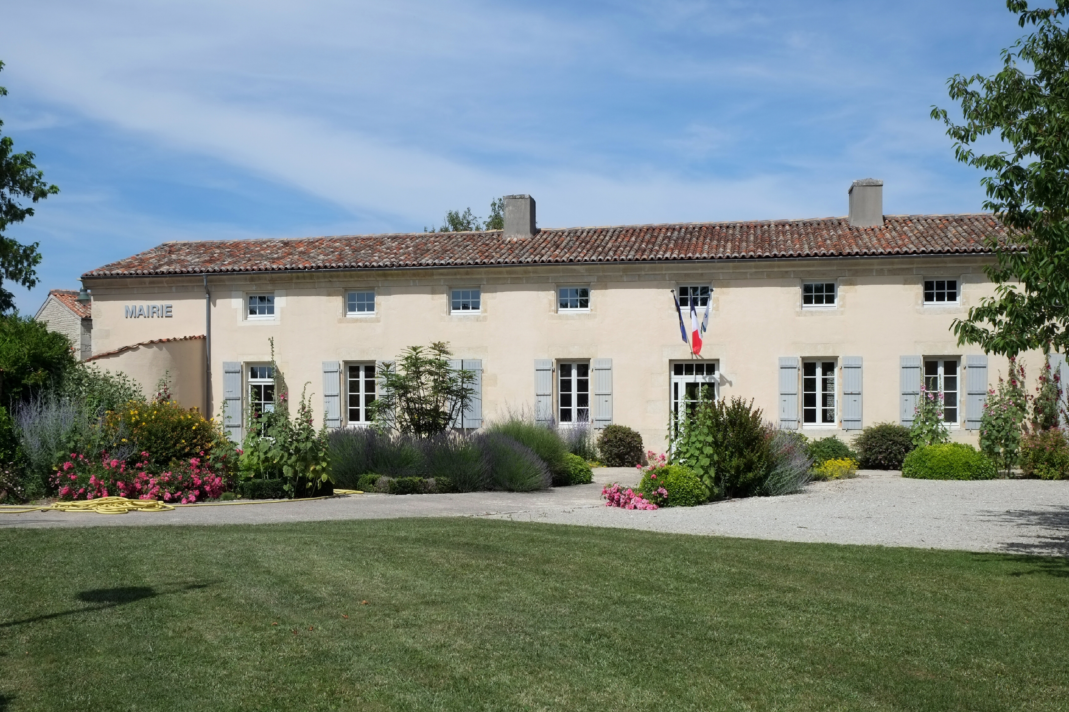 Mairie Vouhé Charente-Maritime France